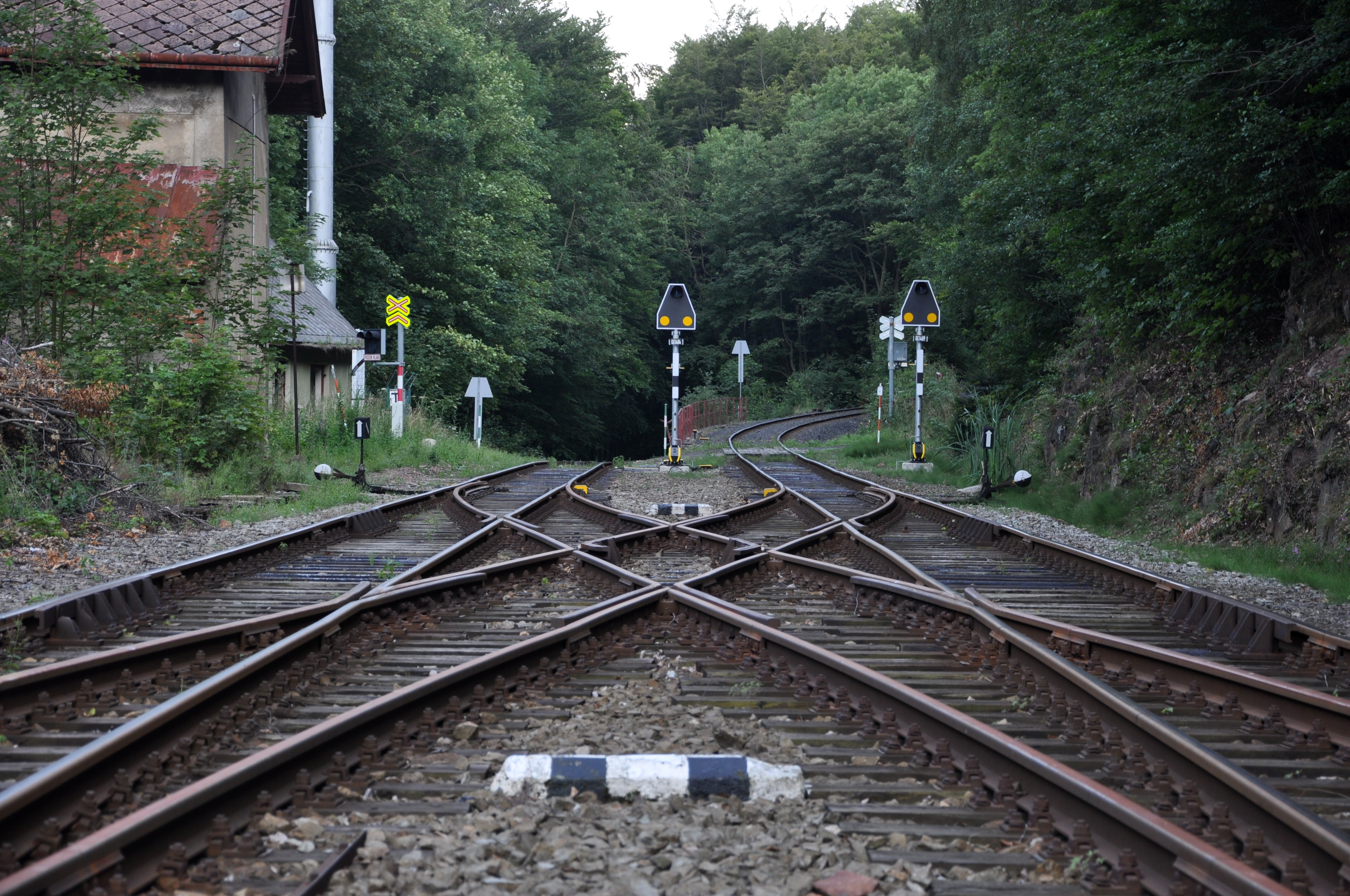 Weichenbereich am Bahnhof Dubí der Bahnstrecke Most–Moldava, Tschechien